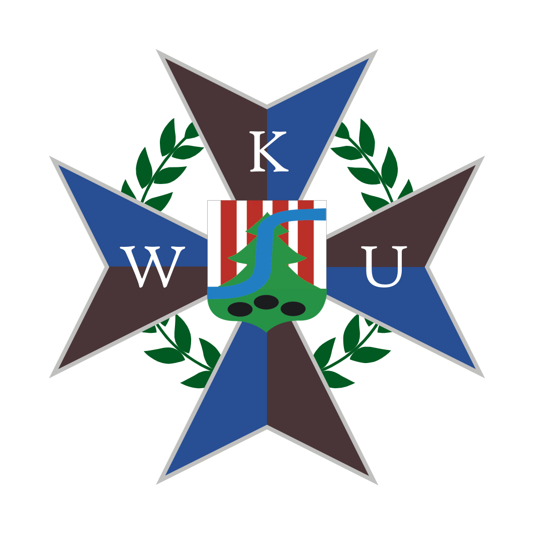 logo wku nisko